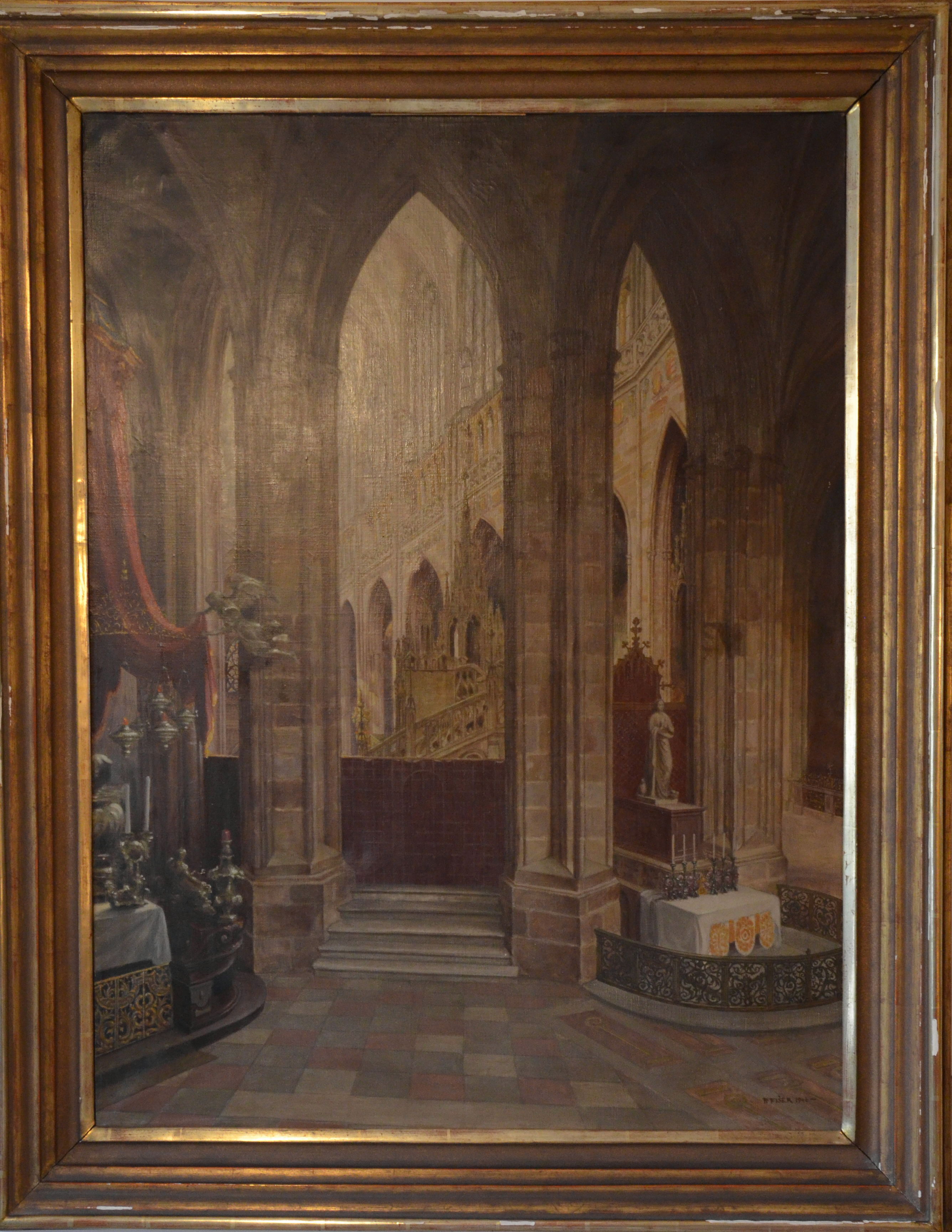 Katedrála sv. Víta, interier